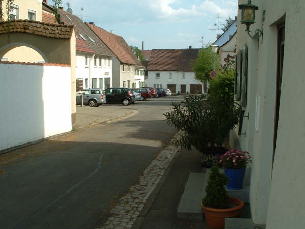 Former Jewish quarter, Laupheim